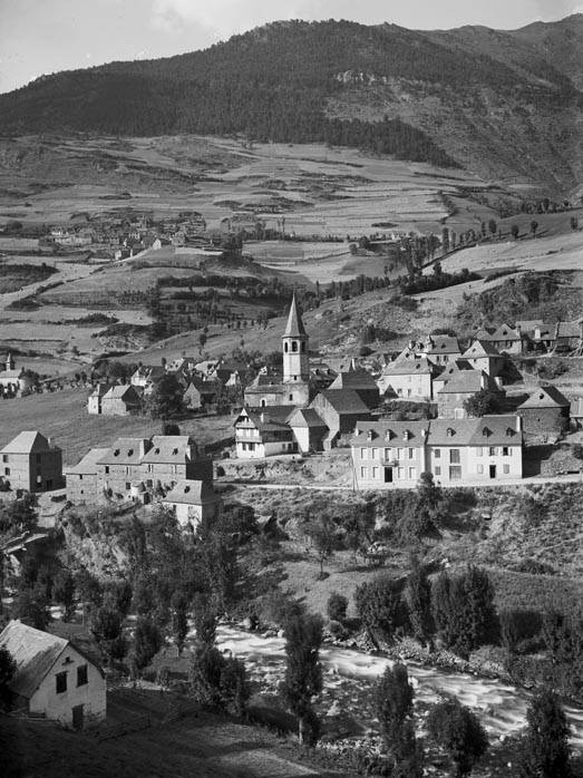 Imatge